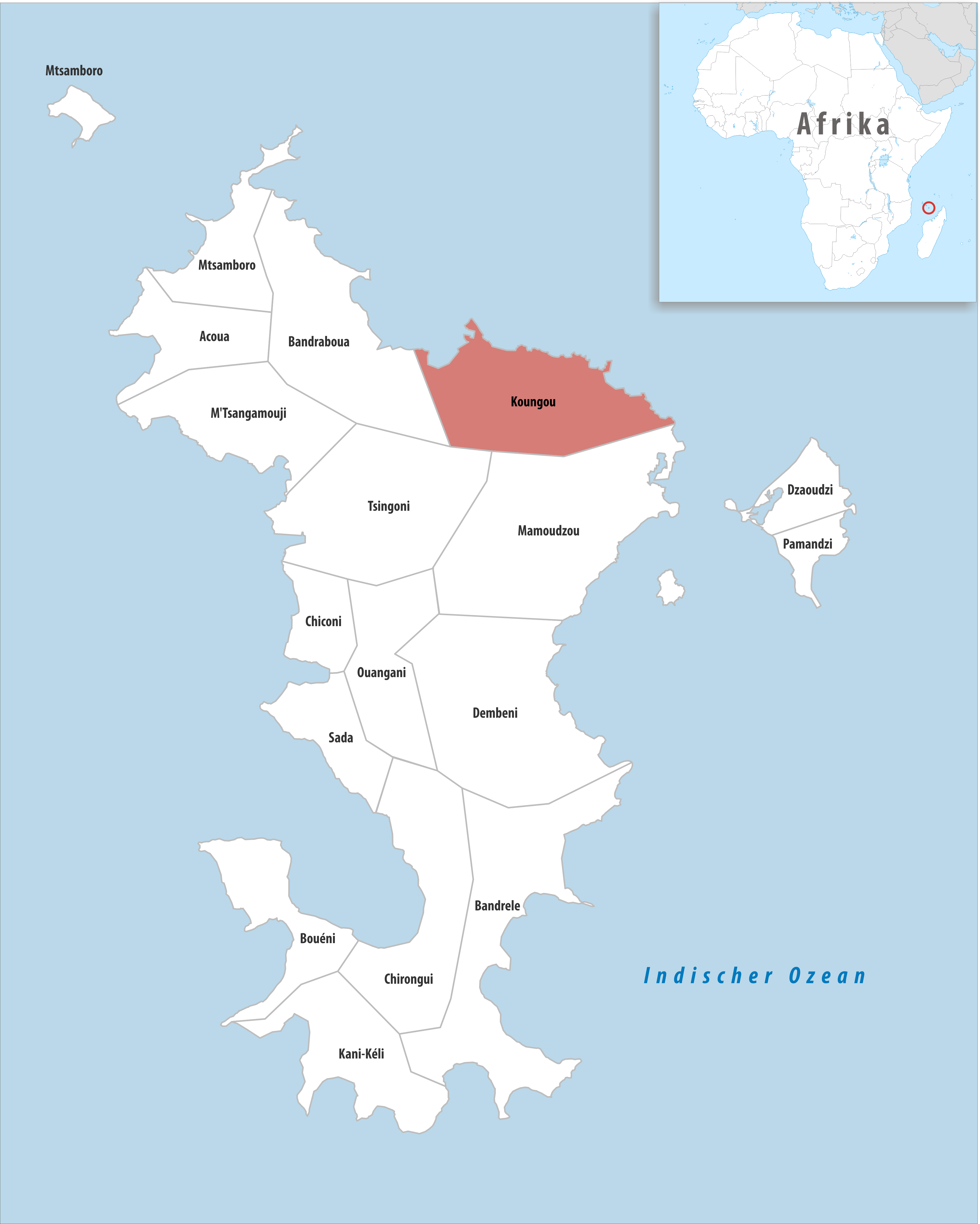 Lage der Gemeinde Koungou